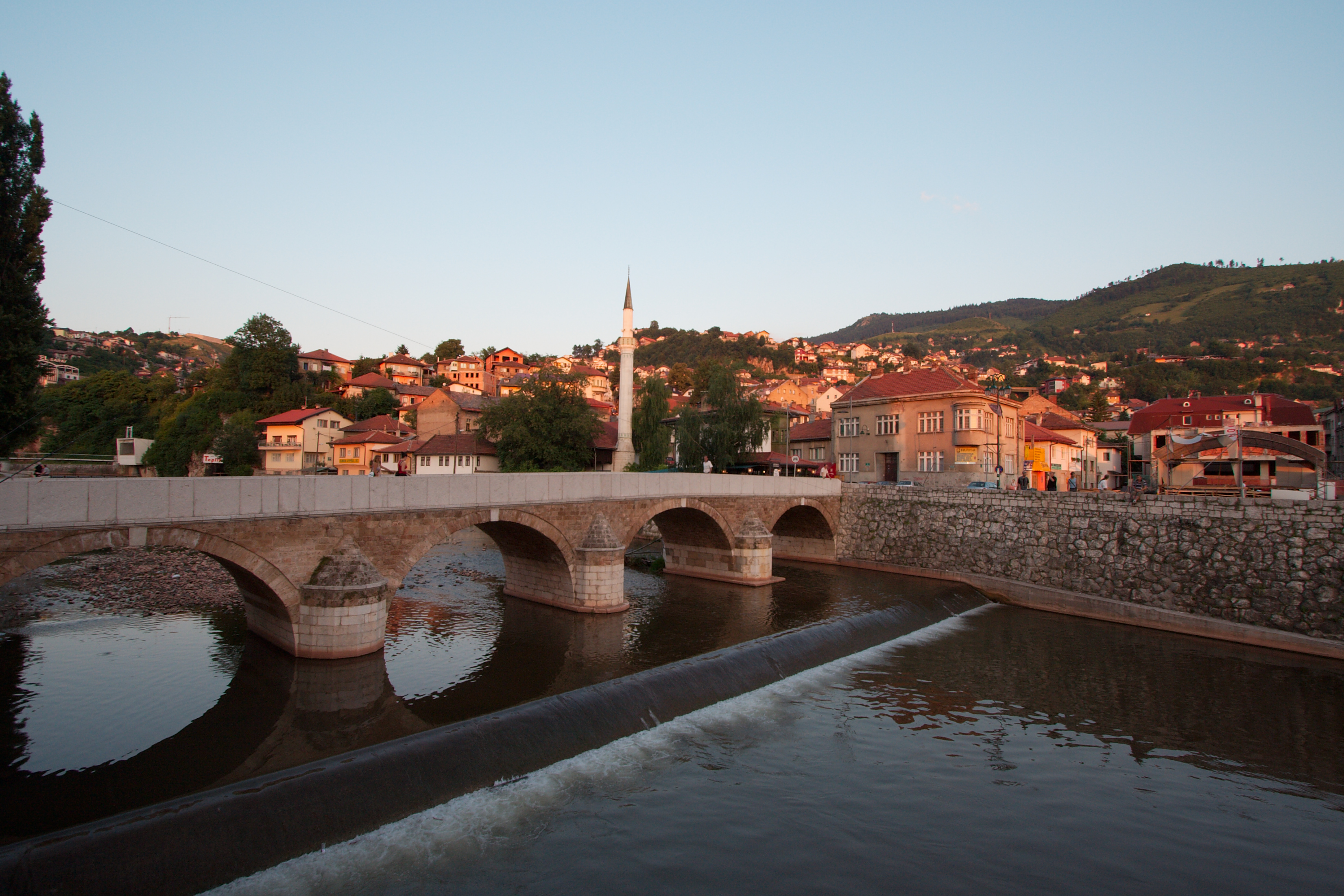 Brücke über die Miljacka